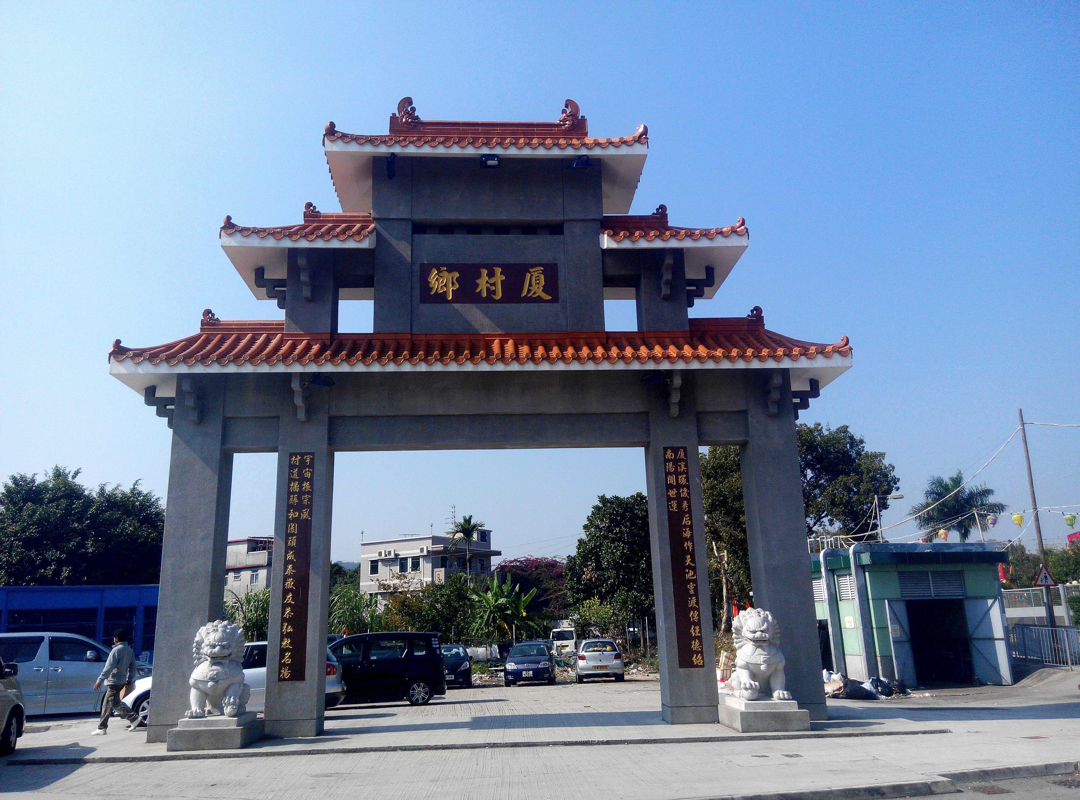 中文（香港）: 廈村鄉牌坊